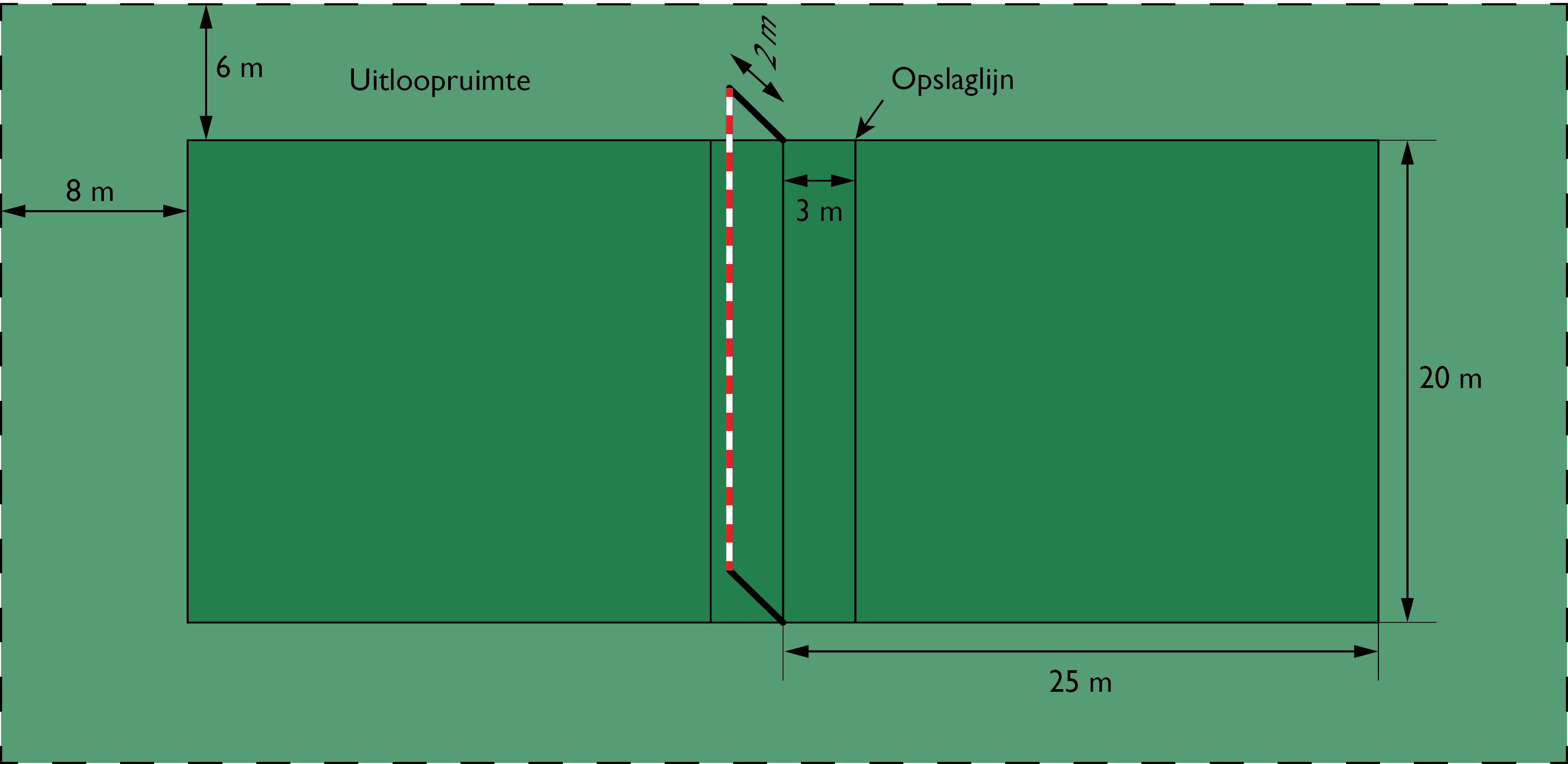 Officiele afmetingen van een vuistbalveld